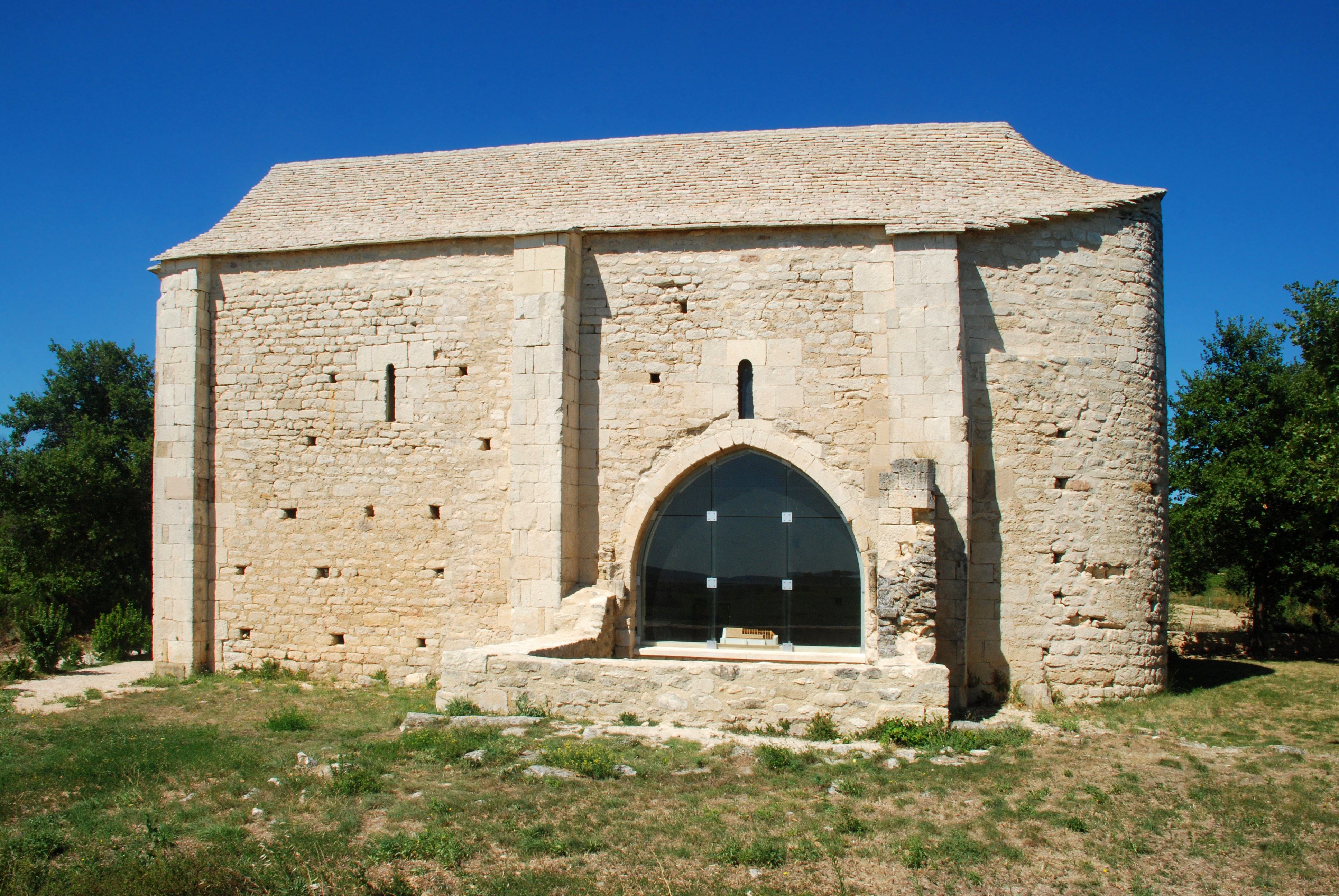 France - Gard - Chapelle Saint-Étienne de Saint-Hilaire-d'Ozilhan .